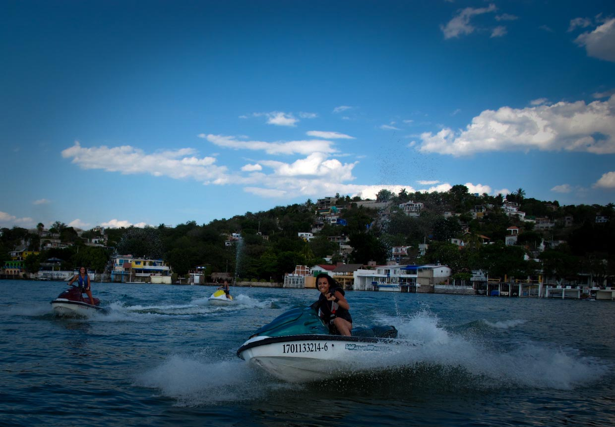 Waverunner en Tequesquitengo Morelos